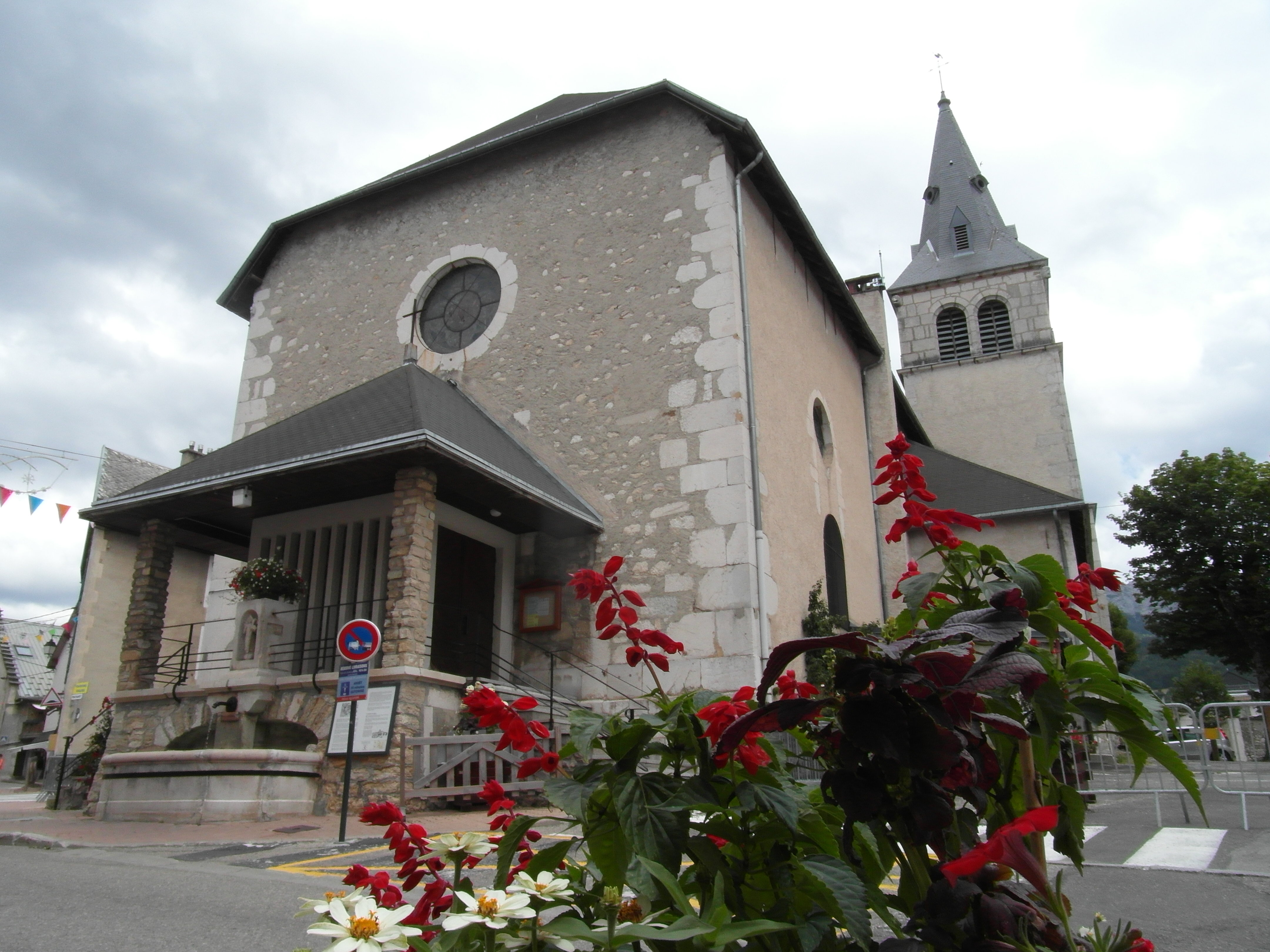 Église Saint-Bonnet à Villard-de-Lans